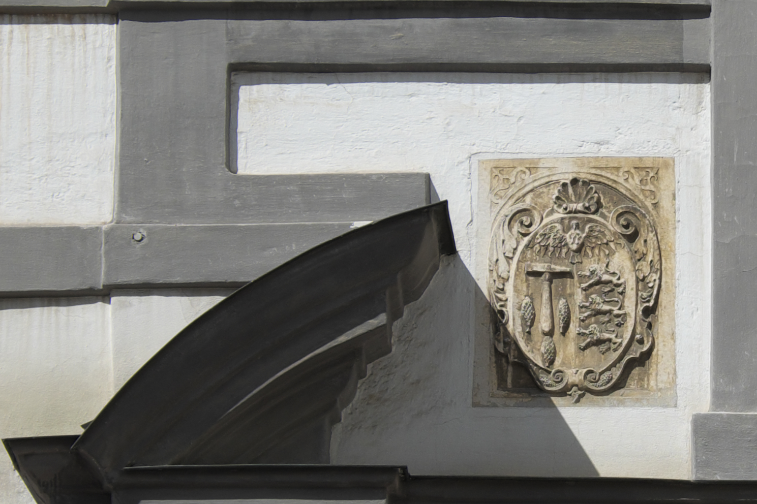 Altes Tor der Universität, heute Akademie für Lehrerfortbildung und Personalführung, in der Kardinal-von-Waldburg-Straße 7 in Dillingen an der Donau (Bayern), Wappen der Universität Dillingen; linkes Feld: Dillinger Hammer umgeben von drei Tannenzapfen; rechtes Feld: 3 Löwen